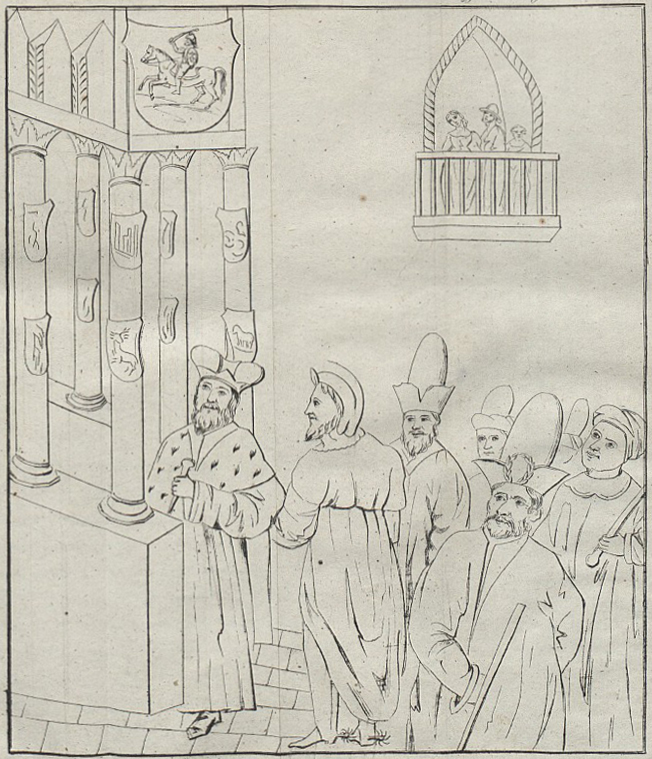 Беларуская (тарашкевіца): Імаверны партрэт караля і вялікага князя літоўскага Міндоўга (Mindoŭh) з гербам Пагоняй (Pahonia)